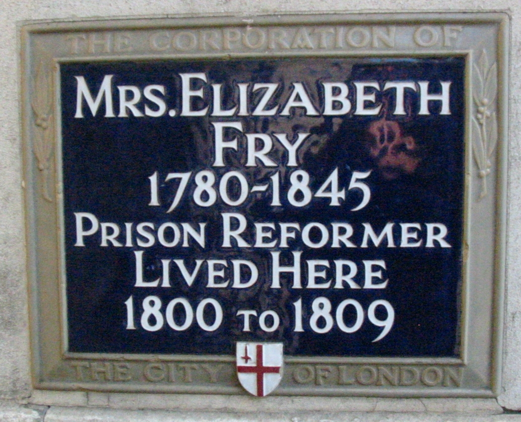 Nrf: Pliaque à Londres